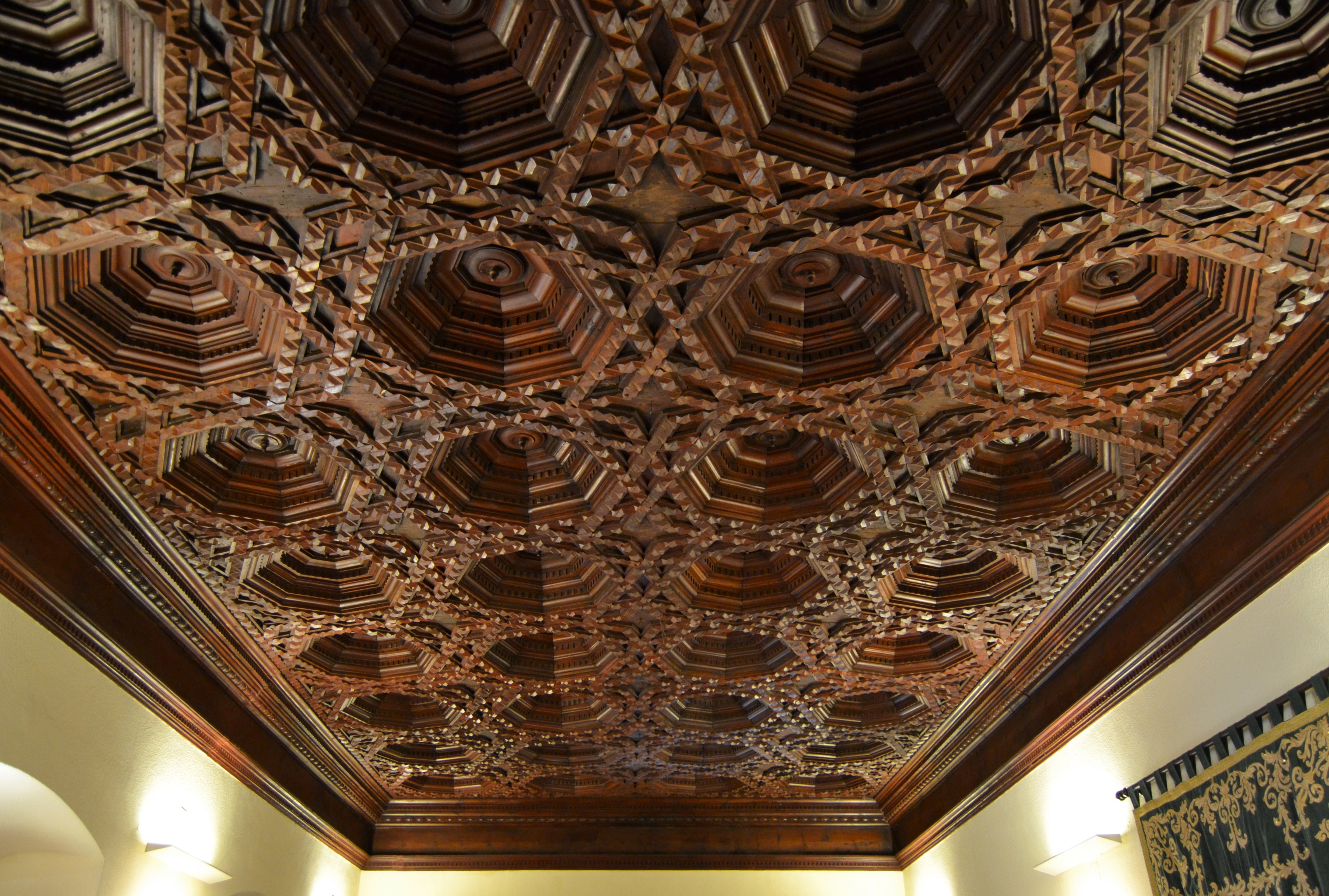 Teginat del saló de plens de l'ajuntament, antic palau, Sogorb.